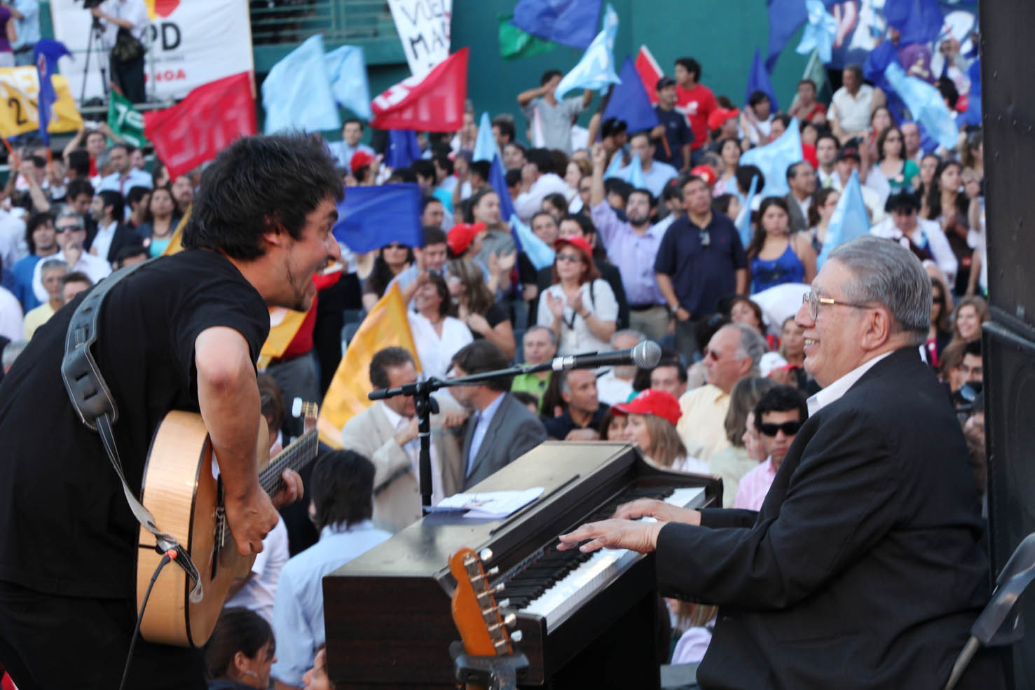 Valentín Trujillo (al piano) junto a Ángel Cereceda Orrego, en el Court Central Estadio Nacional. Campaña presidencial Eduardo Frei Ruiz Tagle.